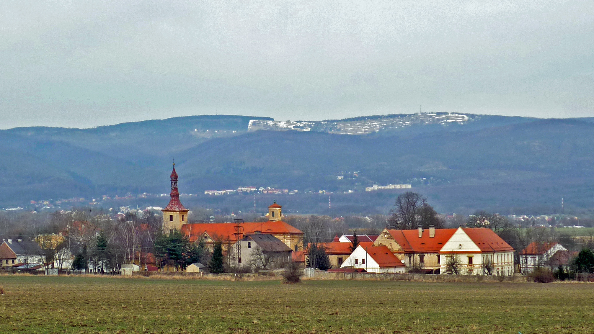 Mariánské Radčice